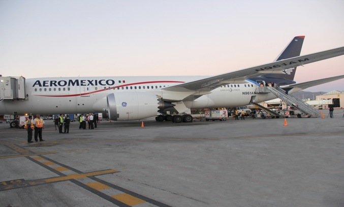 787 de Aeroméxico en su llegada al aeropuerto